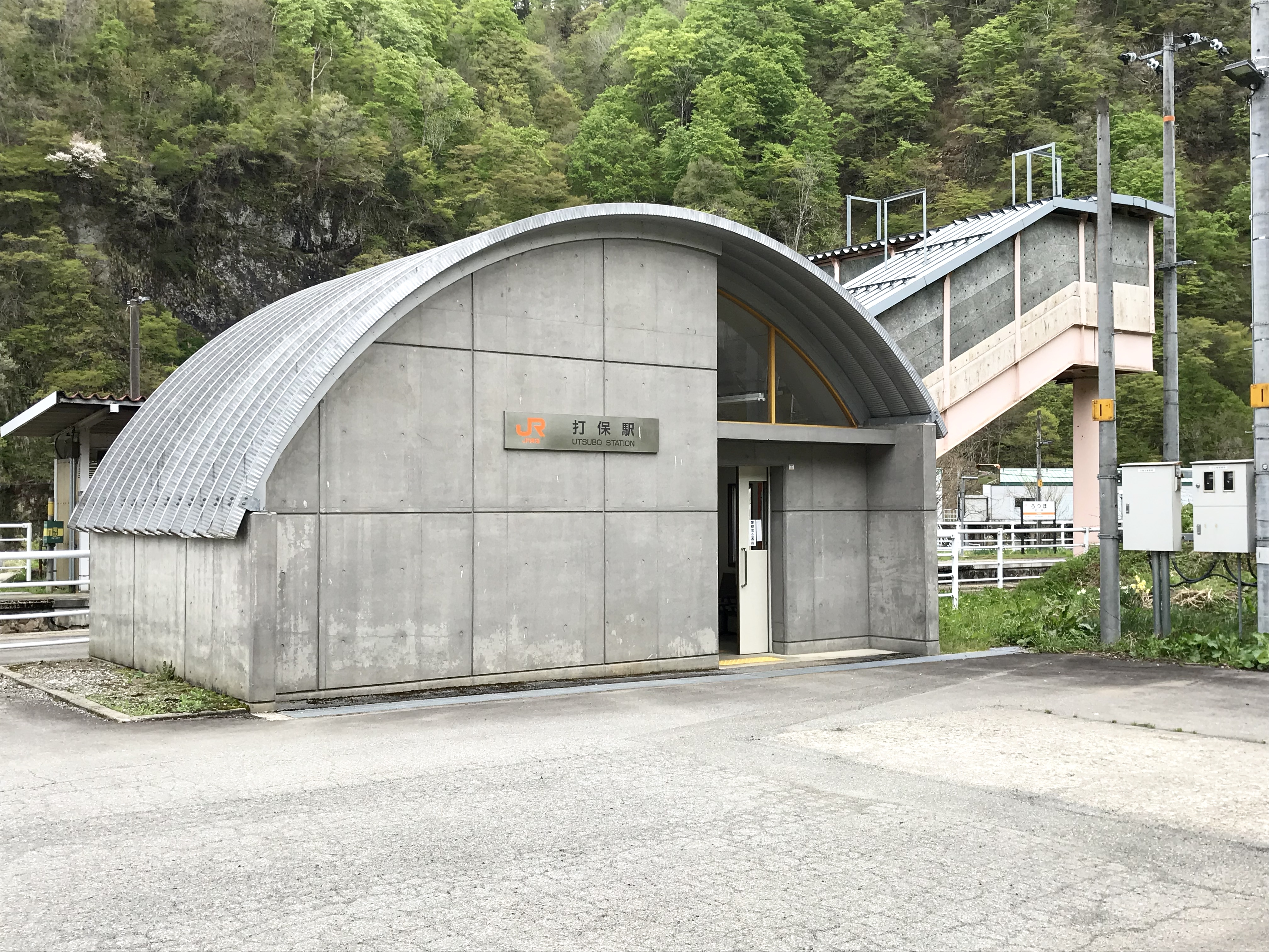 JR東海高山本線打保駅駅舎